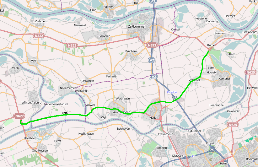 Provinciale weg 831 zoals deze na voltooiing van de omlegging bij Hedel loopt